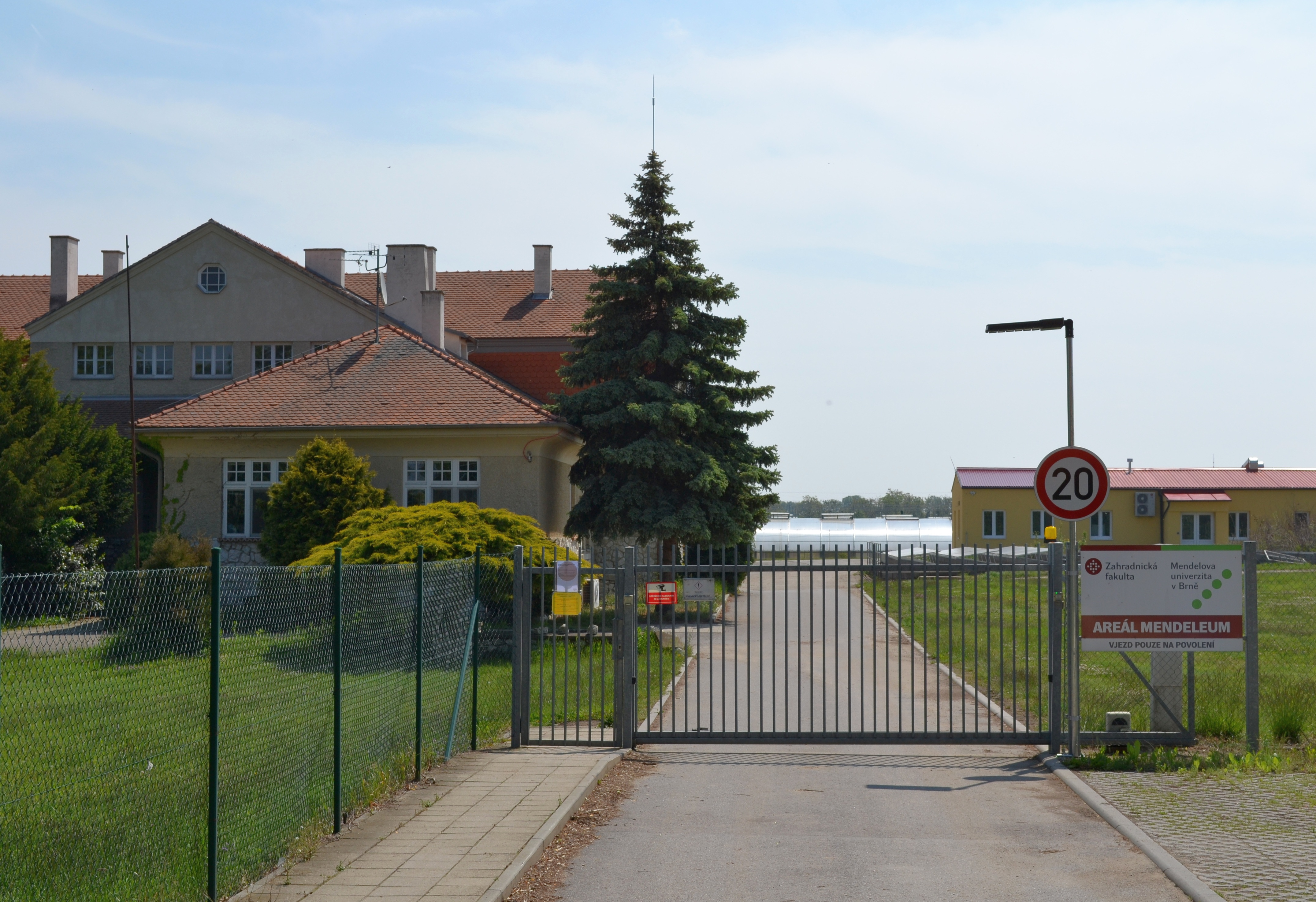 Lednice (okres Břeclav) - ul. Valtická, areál Mendelea MZLU.